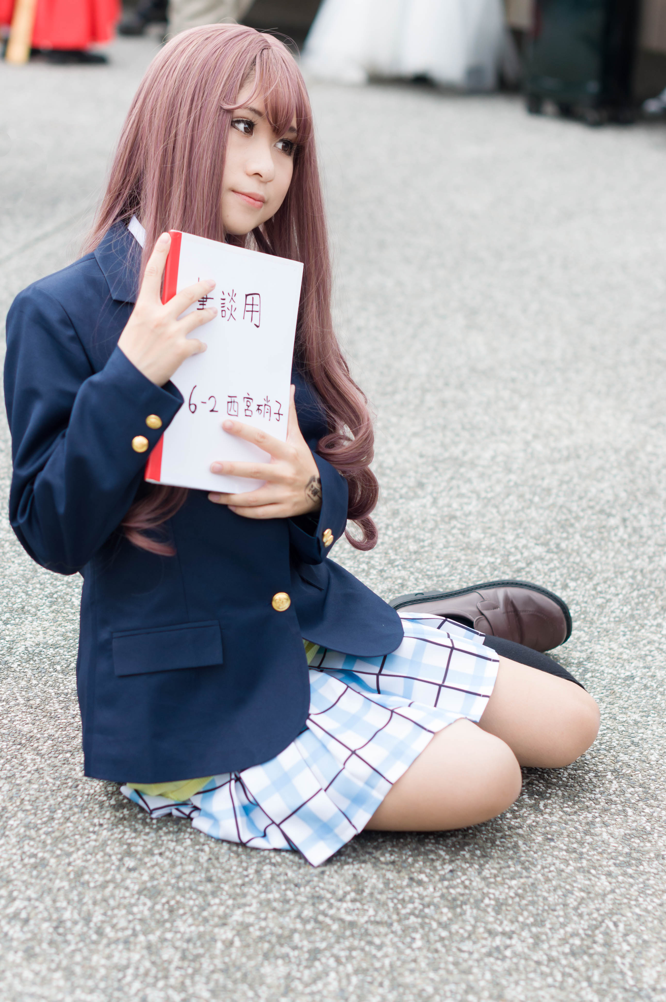 第26屆亞洲動漫創作展，《電影版 聲之形》西宮硝子cosplayer。